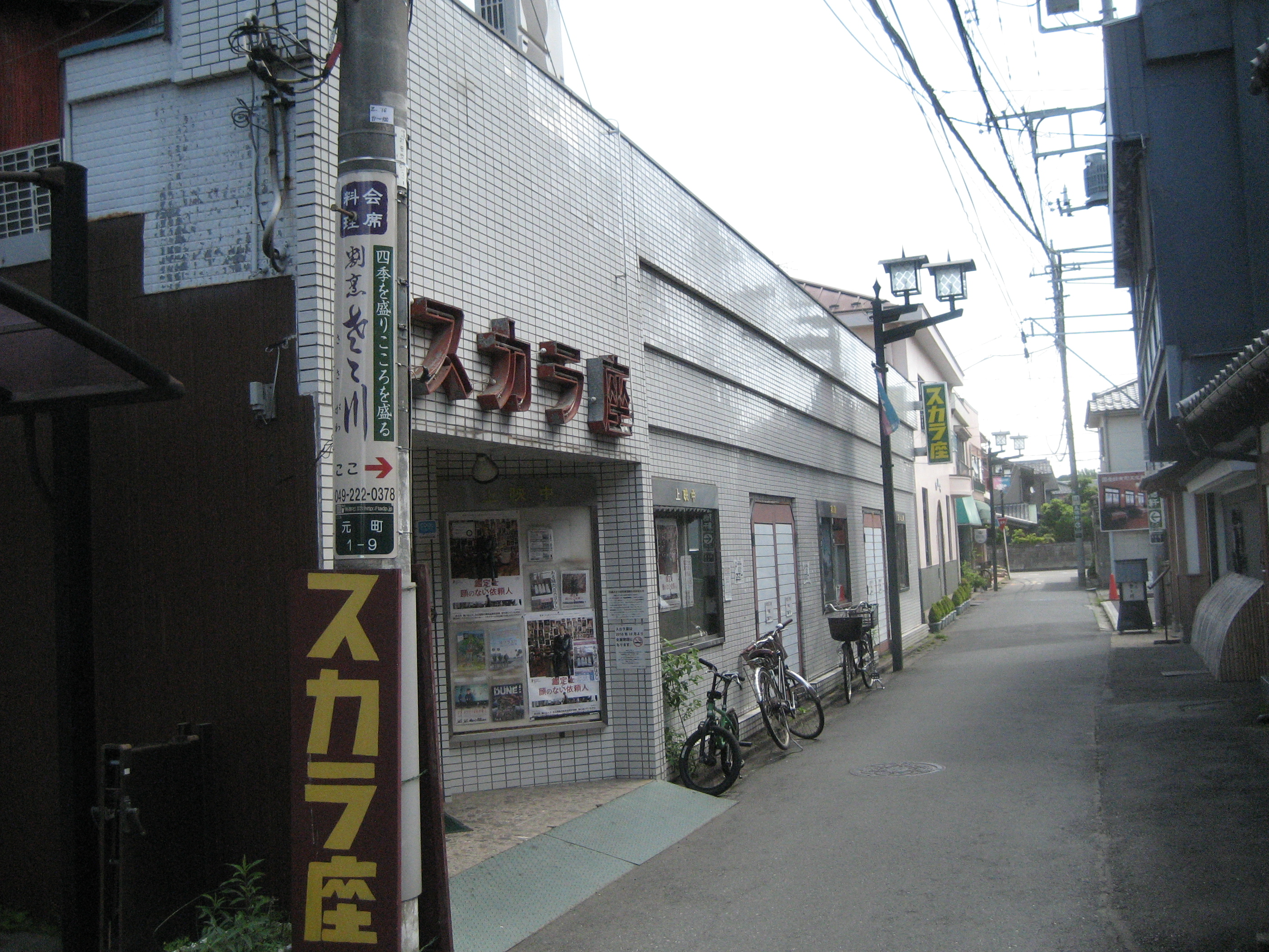 川越スカラ座（建物入り口付近）